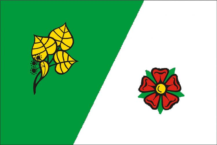 vlajka, Želeč, okres Tábor